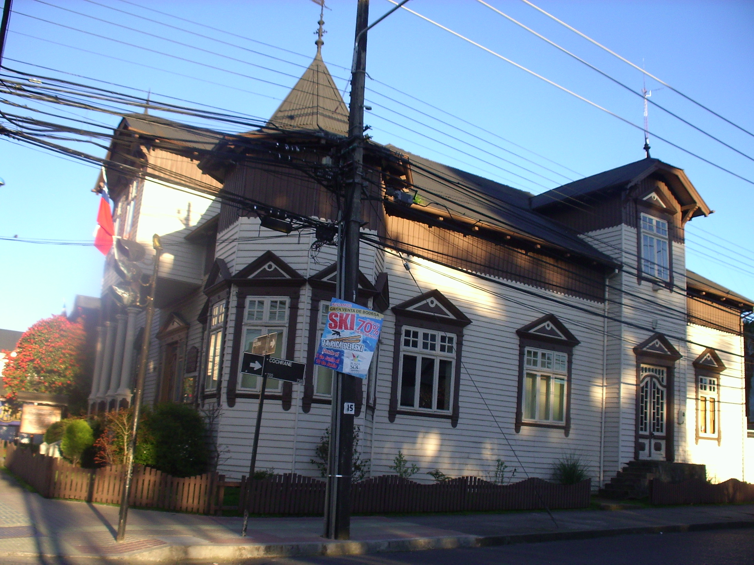 Casa de Enrique Schüller This is a photo of a national monument in Chile: 714